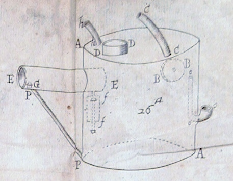 Sous-marin_deuxiememodele.jpg